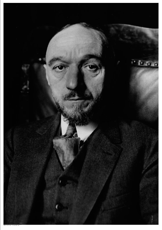 Портретна снимка на Владимир Робев, посланик на България в Полша.